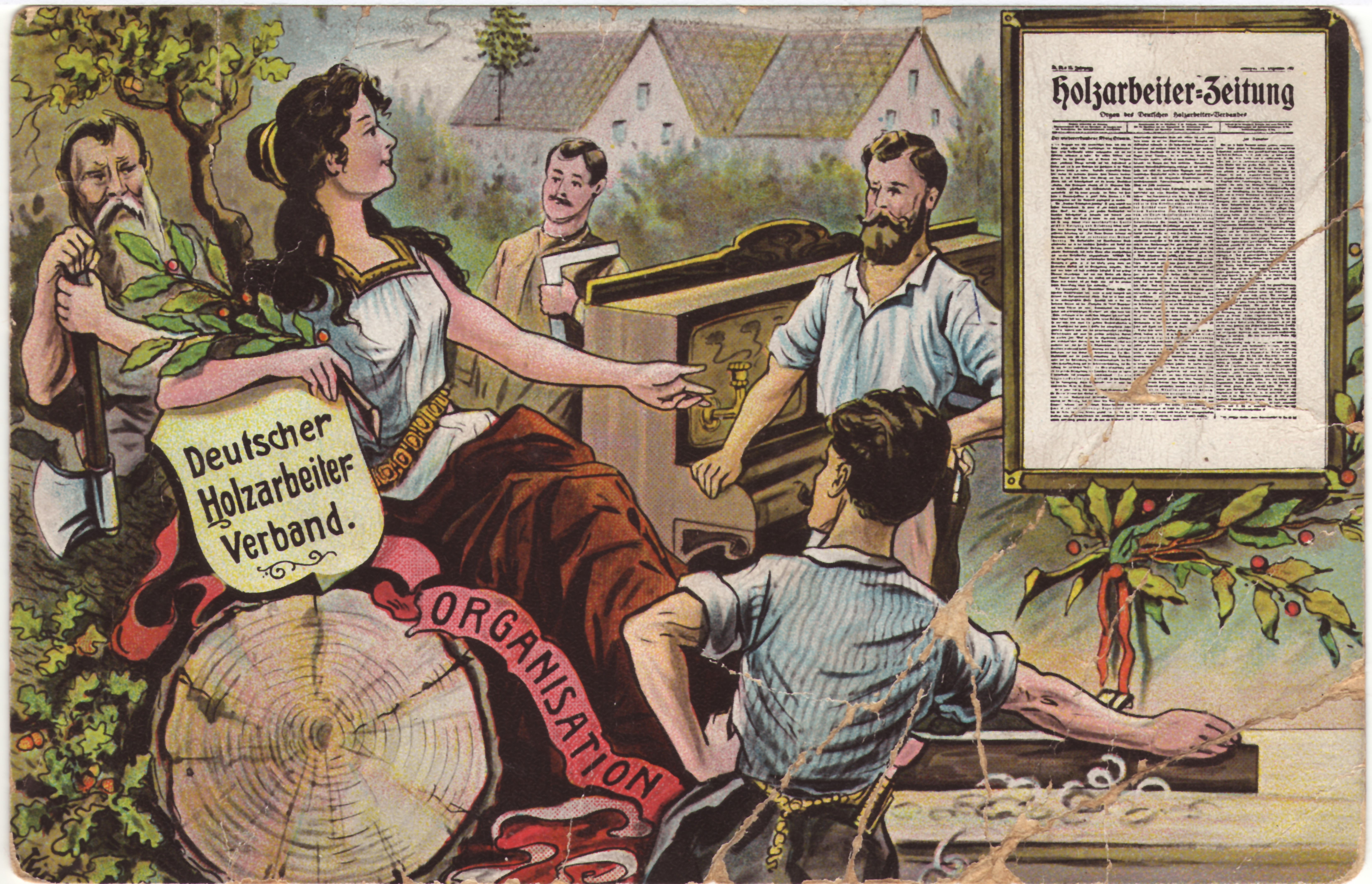 Werbekarte des Deutschen Holzarbeiterverbands, einer Gewerkschaft der holzver- und bearbeitenden Berufe. Sie hat die Form einer Ansichtskarte, die um 1910 postalisch versandt wurde. Neben einigen Berufen, deren Arbeiter im Verband vertreten waren, wie Tischler und Klavierbauer, fällt insbesondere die Holzarbeiter-Zeitung auf, das Organ der Gewerkschaft. Diese Zeitung erschien von 1893 bis 1933 wöchentlich. Die Bibliothek der Friedrich-Ebert-Stiftung hat sie digitalisiert ins Netz gestellt.Link zum Digitalisat der Holzarbeiter-Zeitung [1]